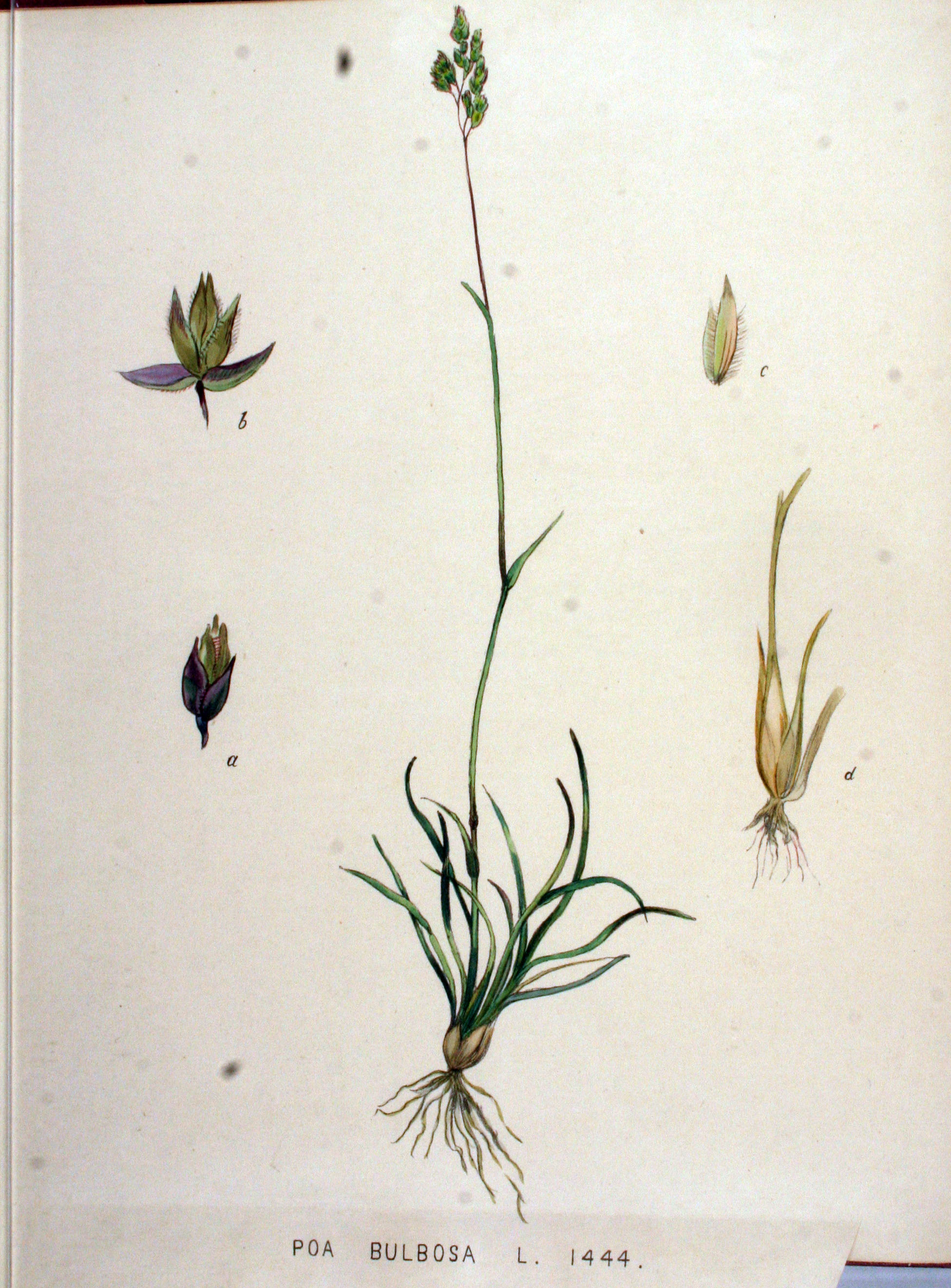 Poa bulbosa L.